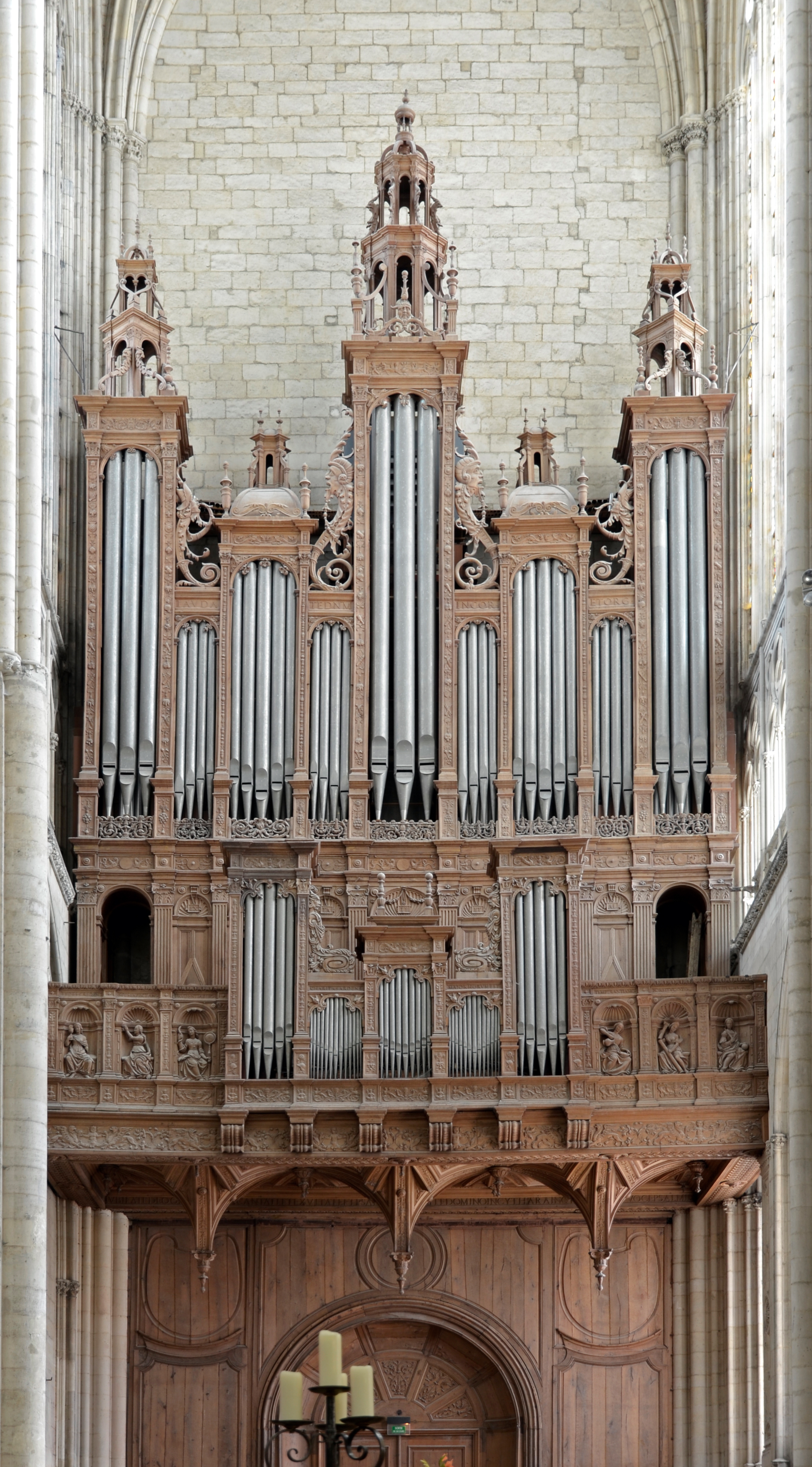 Grand orgue de la Cathédrale Saint-Julien - Le Mans (Sarthe)